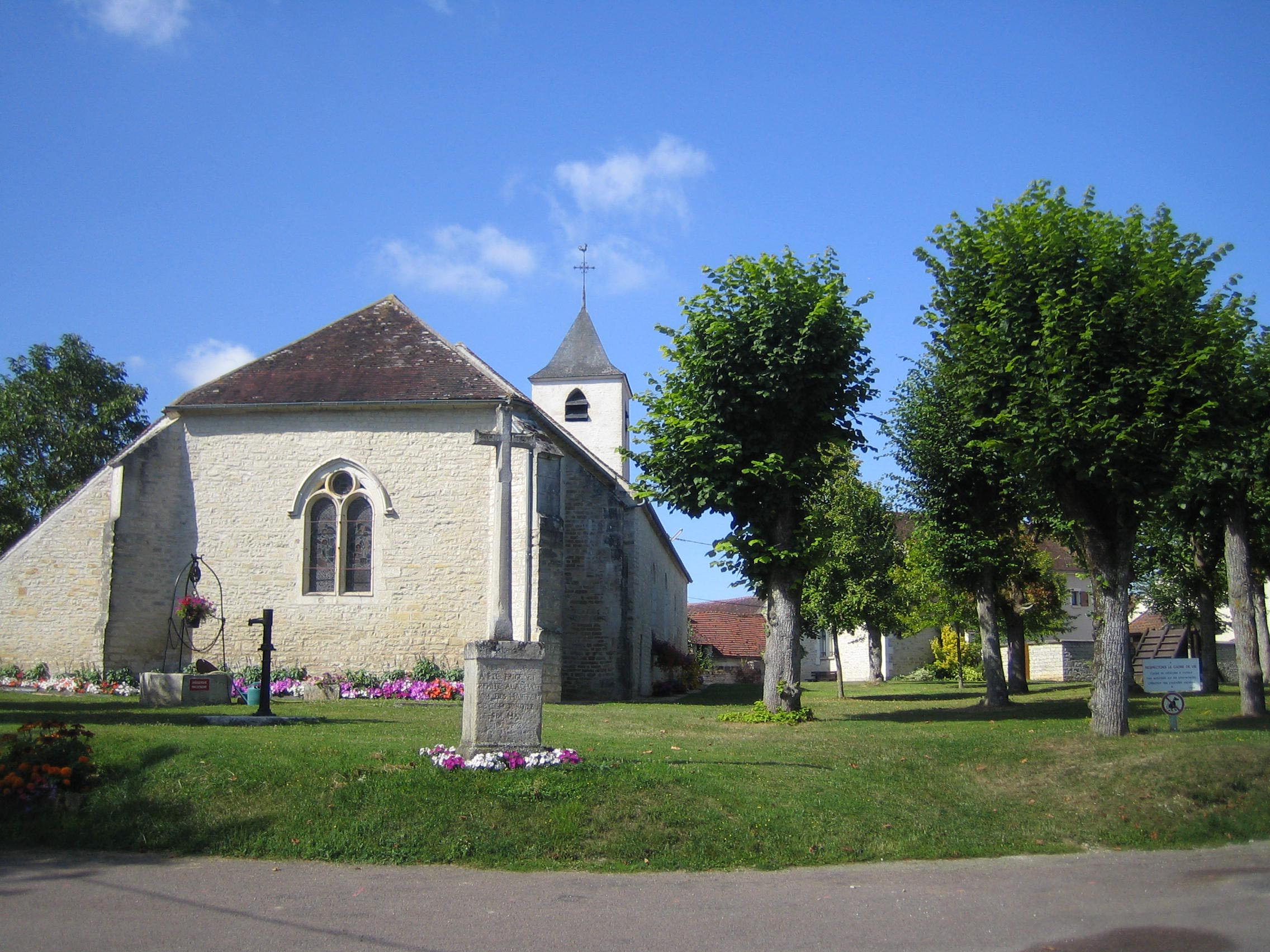 Lichères-près-Aigremont (Yonne, Bourgogne, France). L'église. Août 2009.